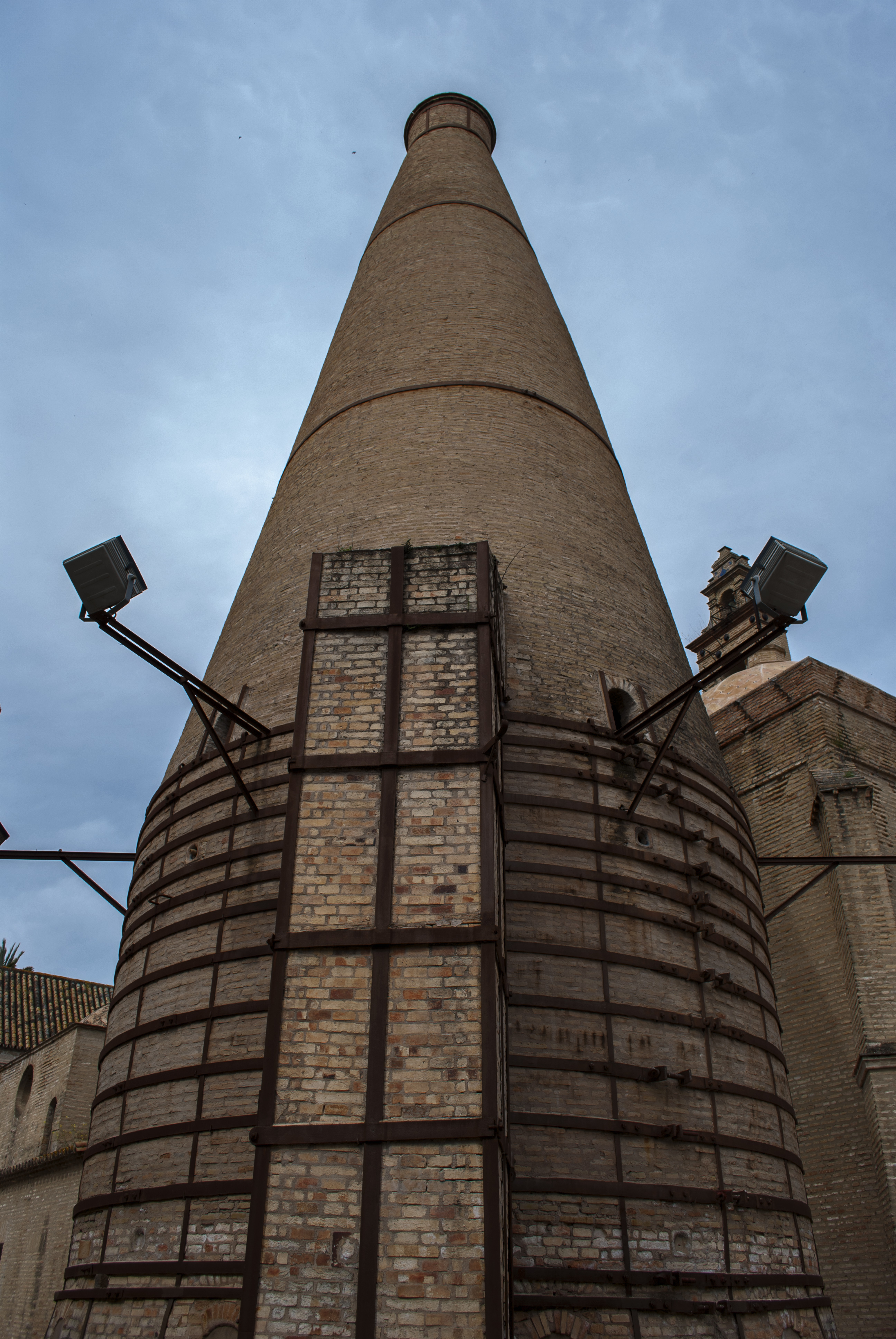 Chimenea de horno de cerámica de la fábrica del Monasterio de Santa María de las Cuevas (La Cartuja de Sevilla).